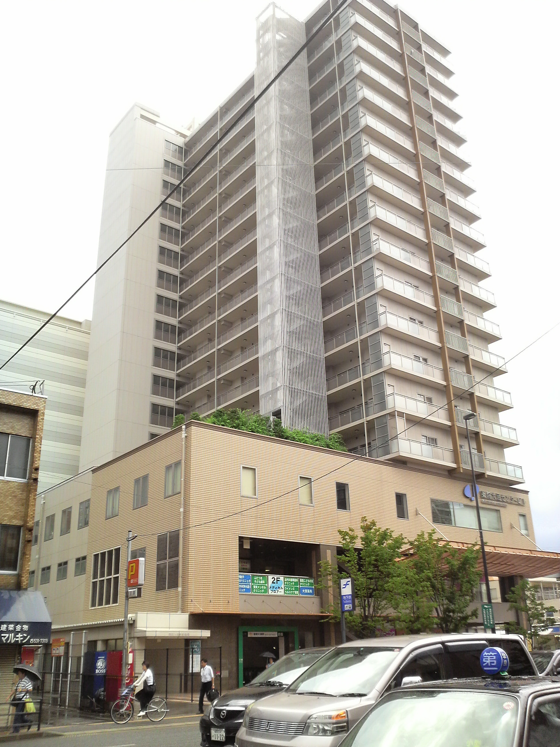 福岡市地下鉄七隈線薬院大通駅２番出口のある薬院大通センタービル